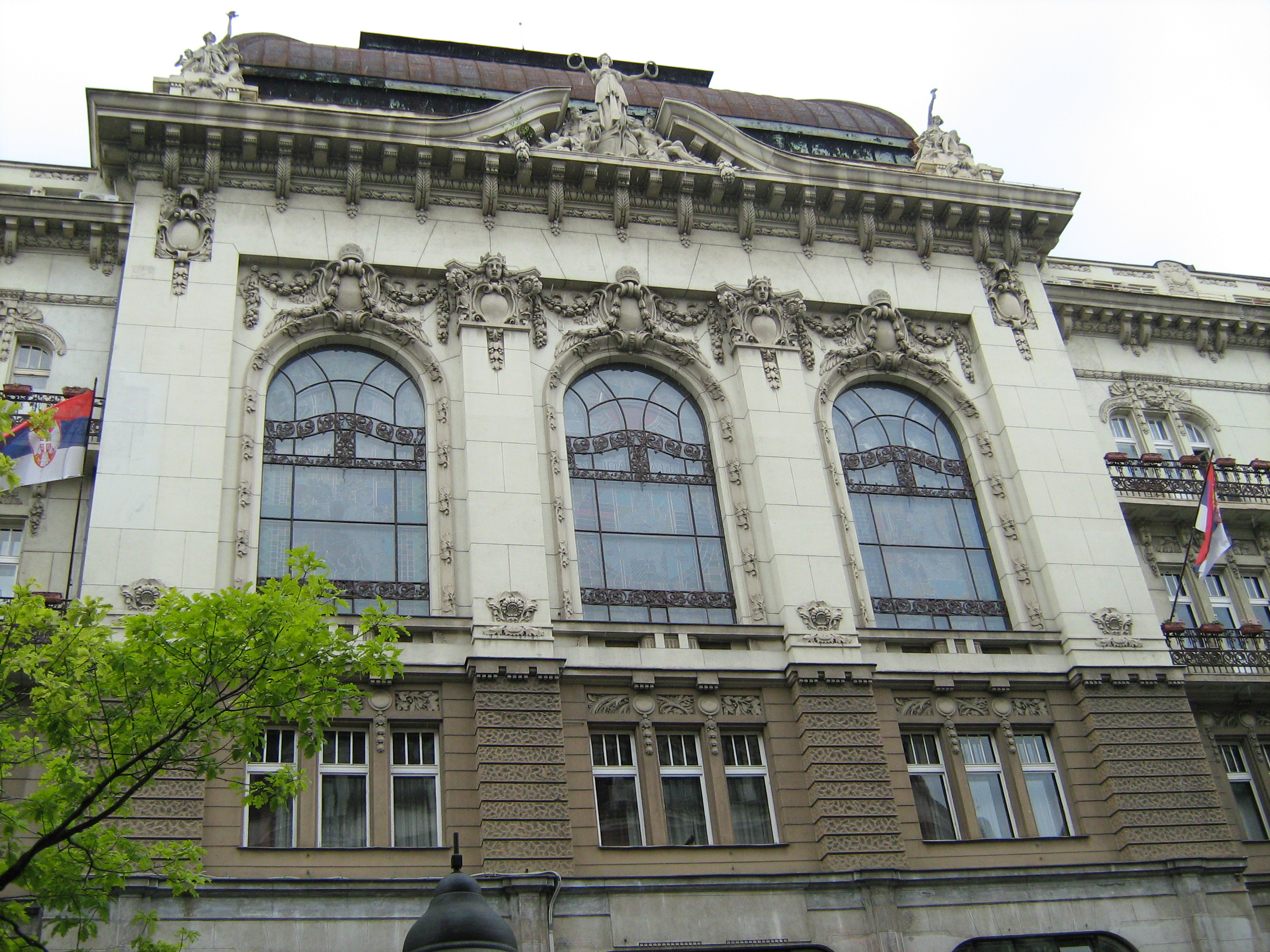 Зграда САНУ, Београд, Кнез Михаилова 35